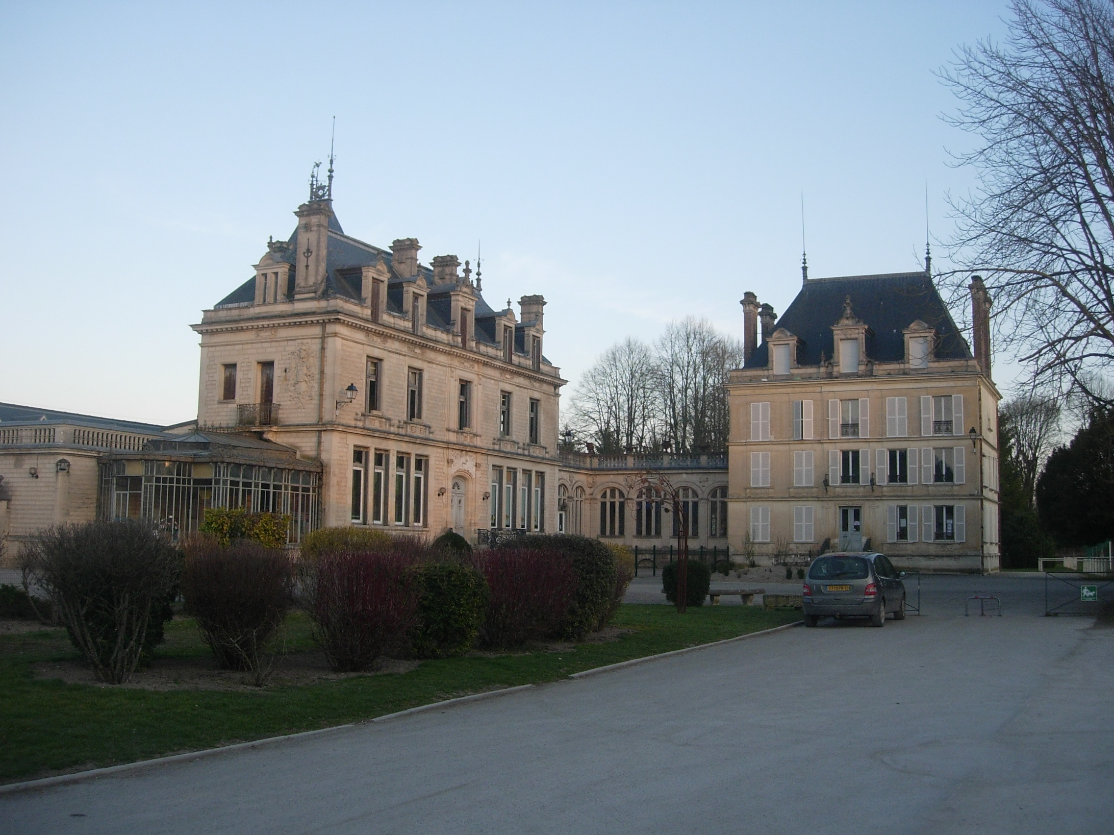 Essoyes (Aube) Hôtel de ville